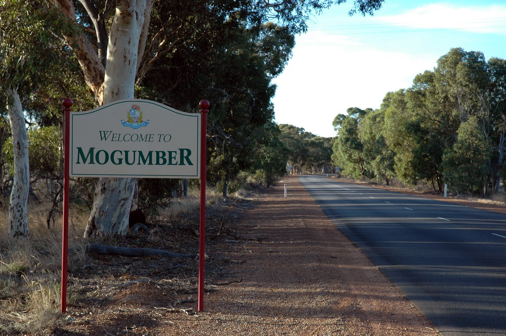 Mogumber, Western Australia.